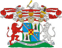 Герб из Общего гербовника дворянских родов Российской империи